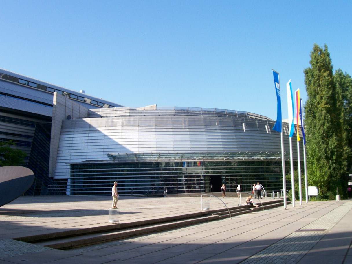 Audimax der TUM. Aufgenommen im Sept.05.